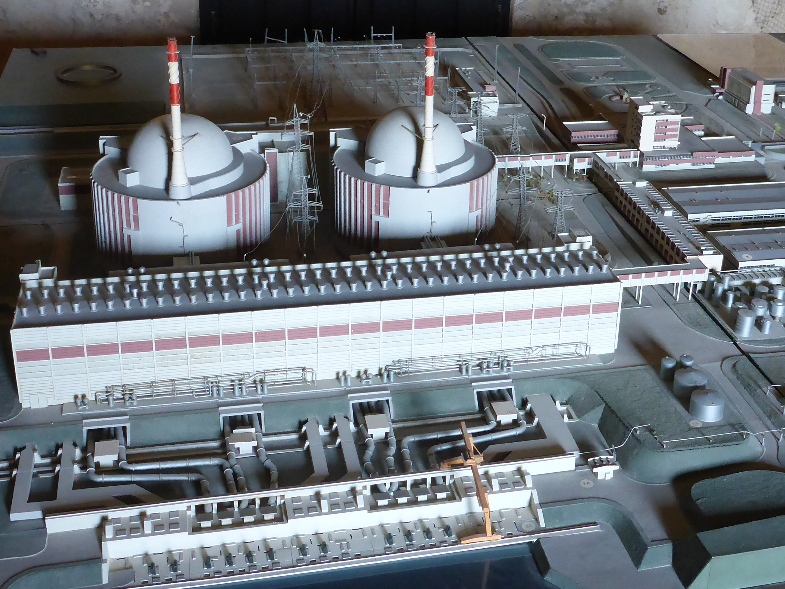 Architekturmodell des geplanten Kernkraftwerks von Juraguá, ausgestellt im Castillo de Jagua, Cienfuegos